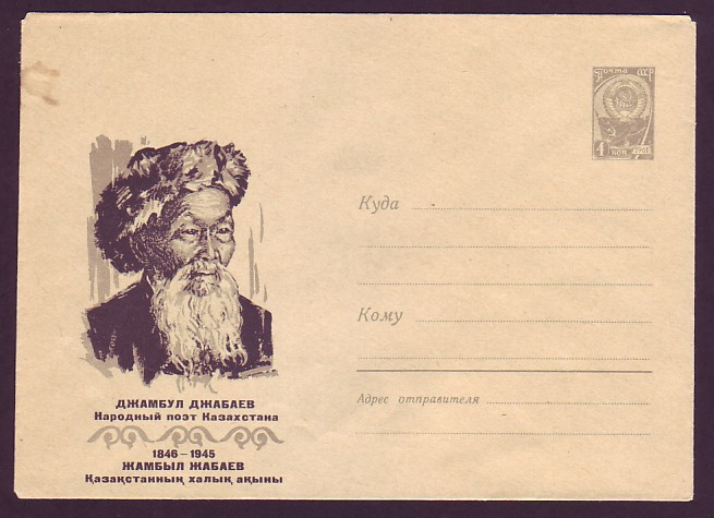 Джамбул Джабаев почтовый конверт 1966